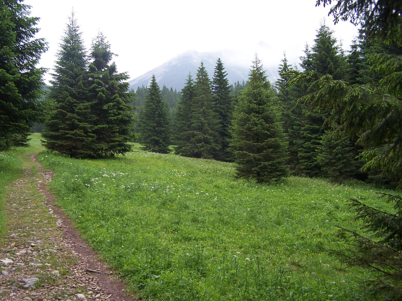 Niżnia Polana Tomanowa